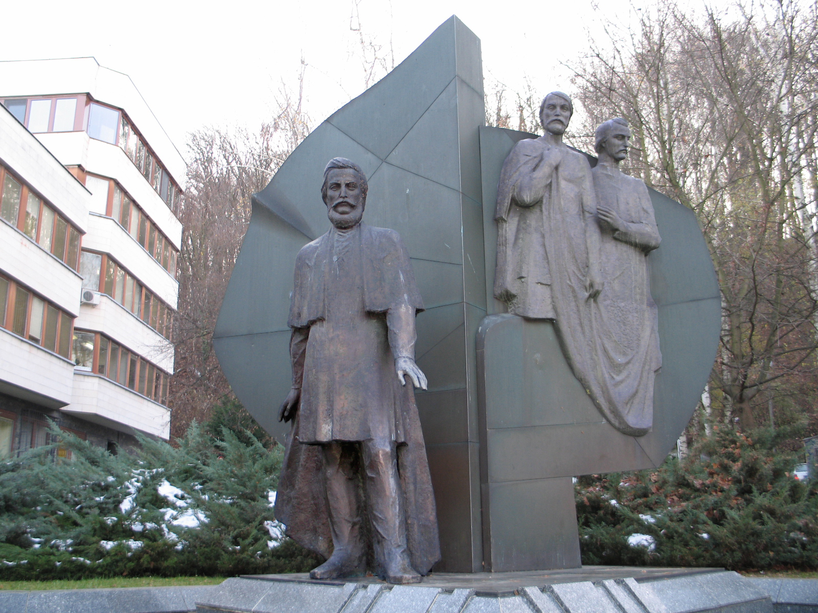 Bronzová plastika Ľudovíta Štúra v Trenčíne. Autormi pamätníka sú akad. soch. Milan Ormandík, Ing. arch. Ivan Michalec, DrSc., Ing. arch. Miloslav Mojžiš, 1991. Na mramorovom podstavci štylizovaný bronzový list lipy, z ktorého pravej polovice vystupujú postavy Hurbana a Hodžu. V popredí bronzová socha Ľudovíta Štúra v nadživotnej veľkosti.